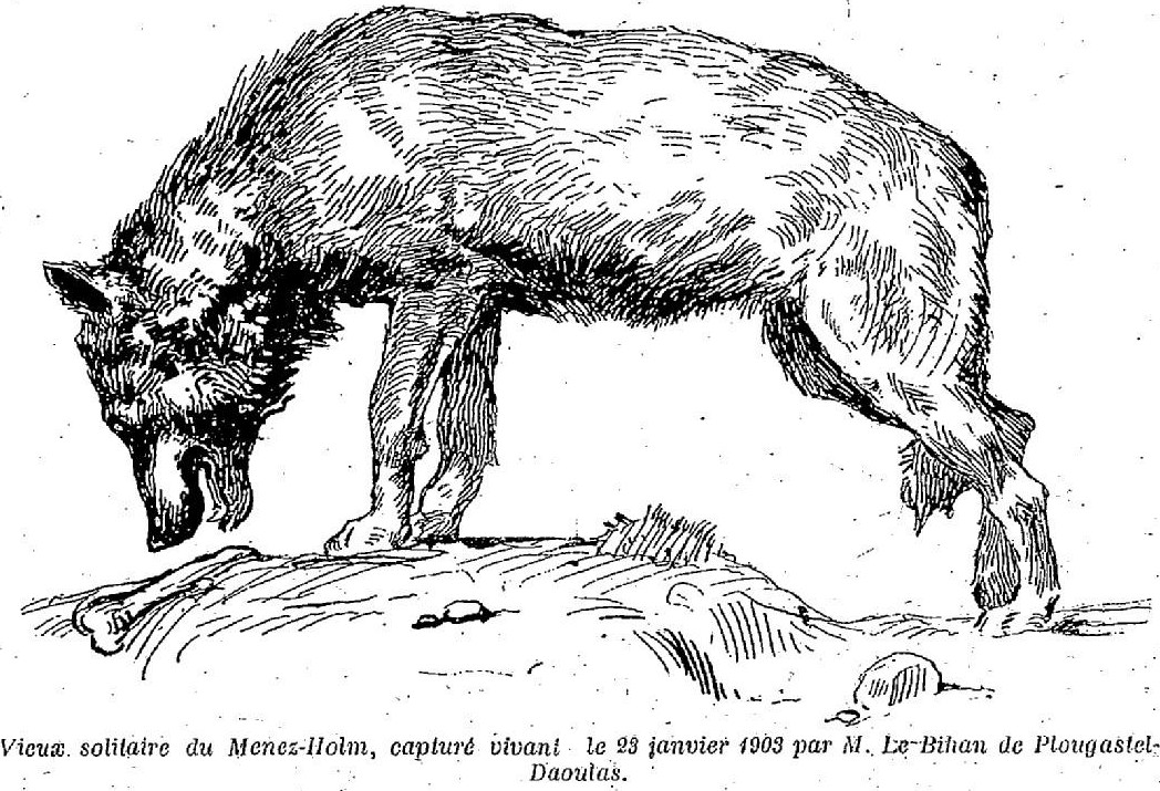 Petit Bleu, le dernier loup du Menez-Hom, capturé le 23 janvier 1903